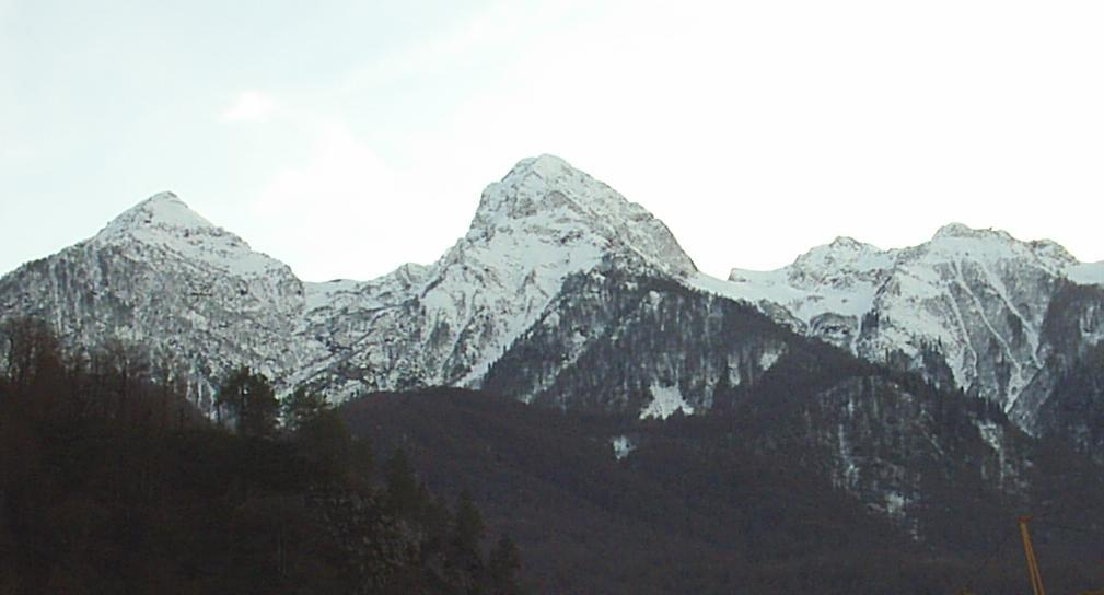 Вид на пик Чёрная пирамида со стороны нижней станции канатной дороги ГТЦ ОАО Газпром